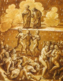 Divina Commedia, Inferno, Canto XV